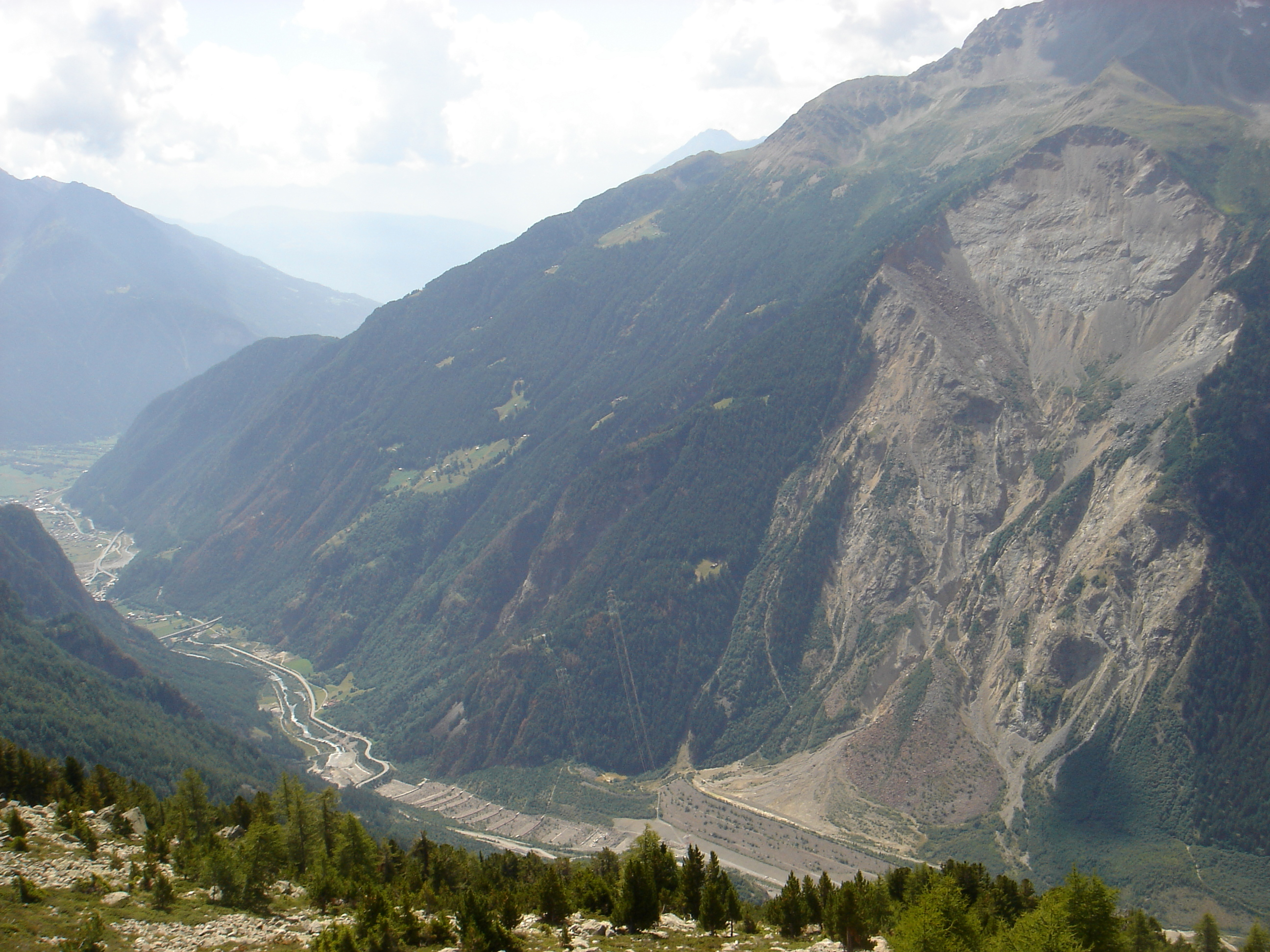 Frana del 1987 vista dalle baite di boero